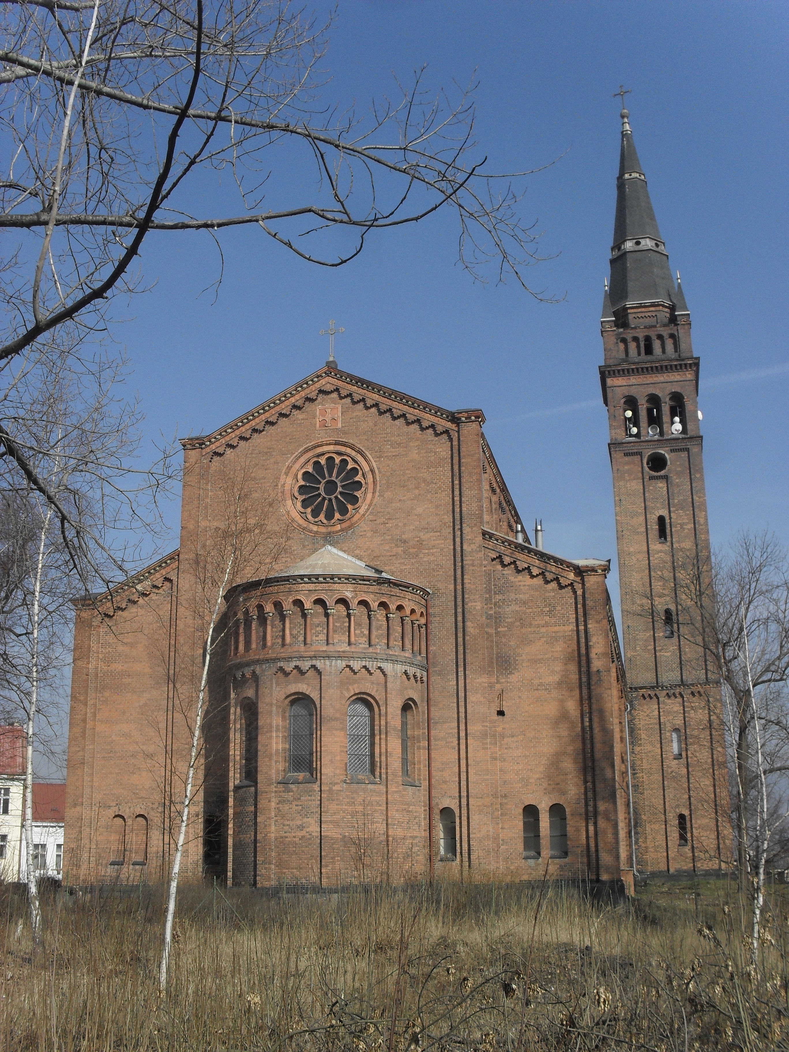 Kostel apoštola Bartoloměje (Teplice) - nachází se v historickém středu města, poblíž Teplické konzervatoře.